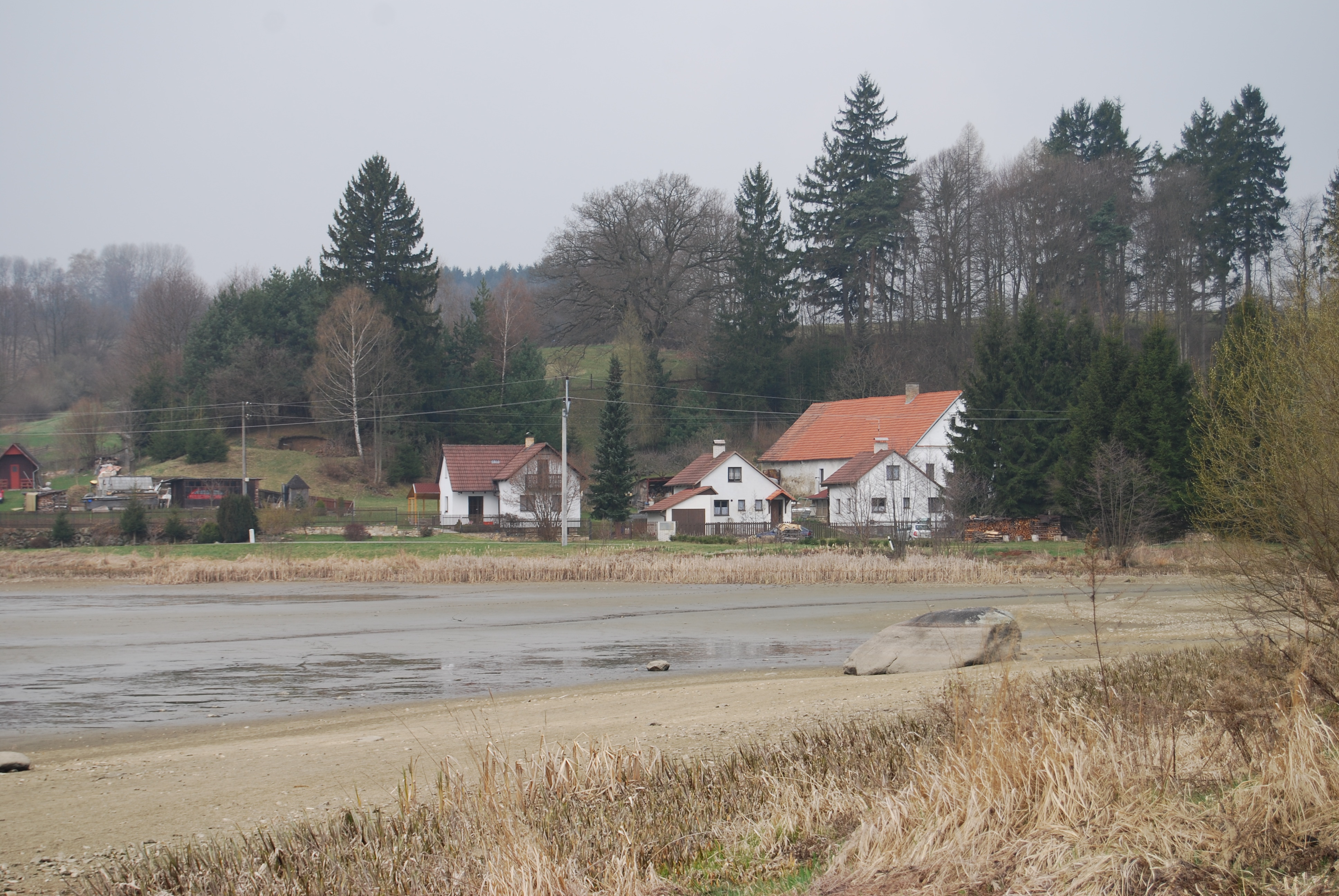 Pohled na část obce přes Nadějkovský rybník. Podchýšská Lhota je malá vesnice, část obce Chyšky v okrese Písek. Česká republika.